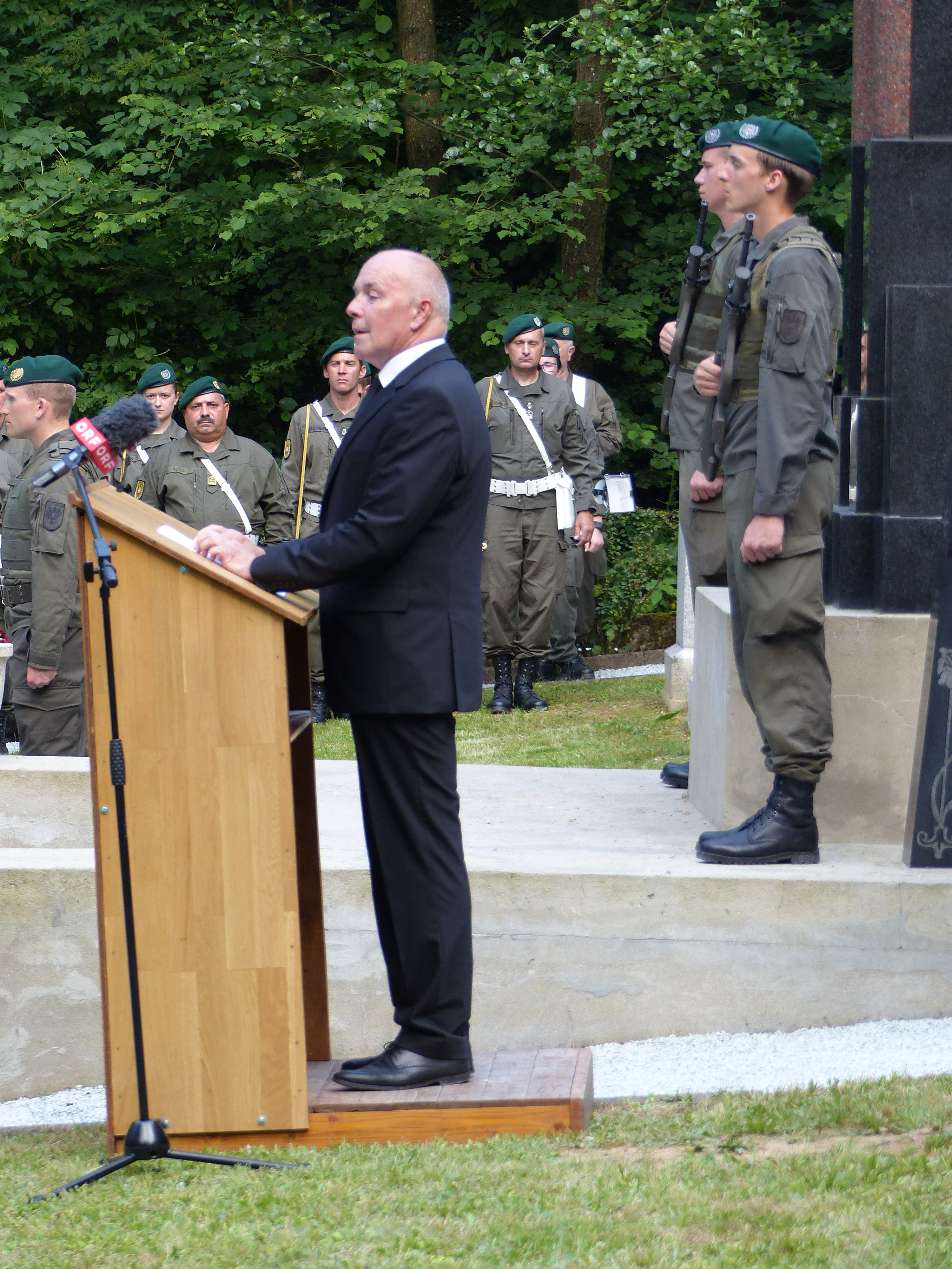 Begräbnis sowjetischer Soldaten 24. Juni 2016 - Oberwarts Bürgermeister Georg Rosner